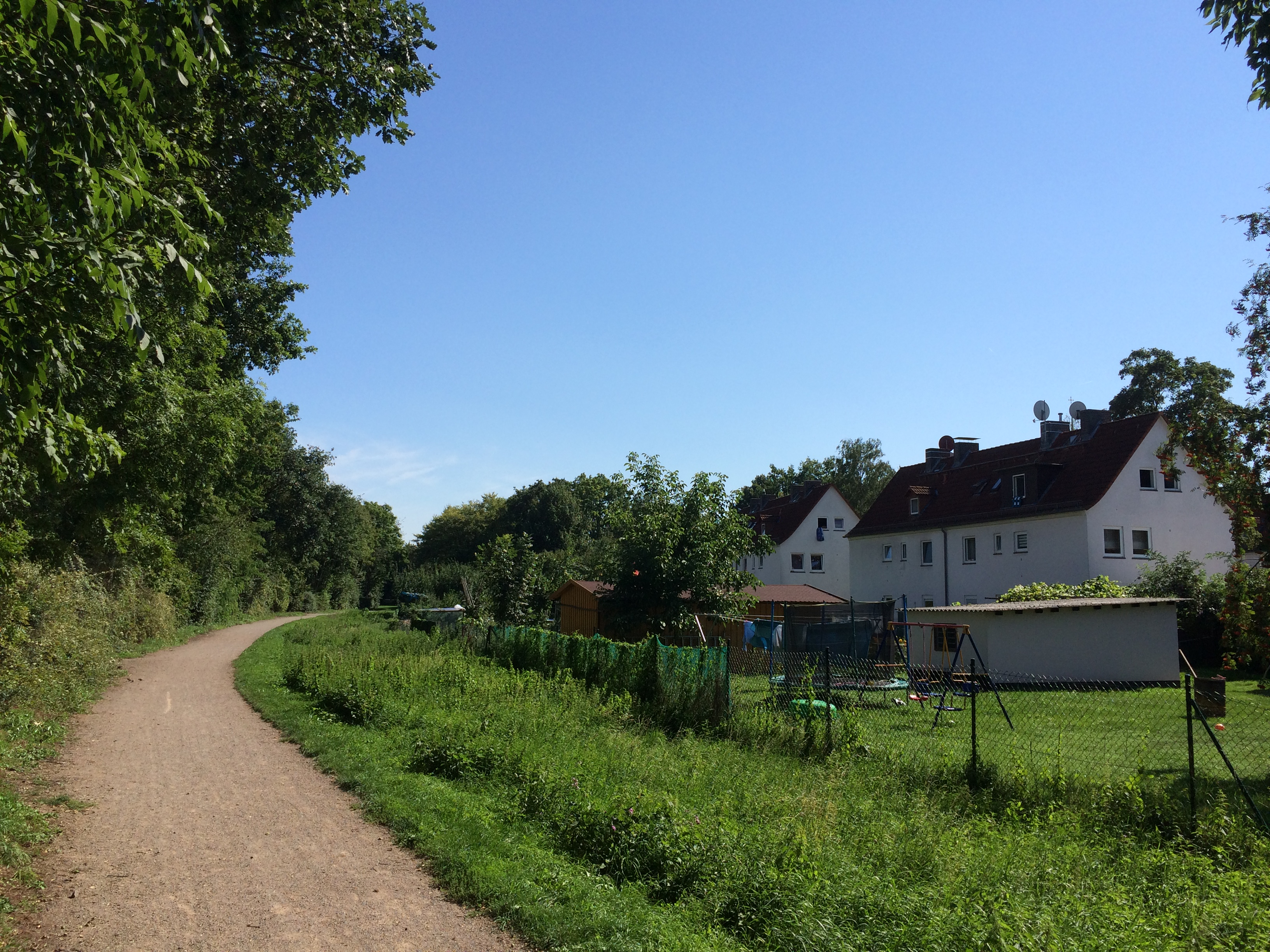 Ehemalige Bahntrasse der Söhrebahn zwischen Windhukstraße und Forstbachweg